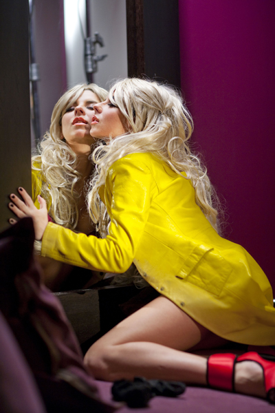 Анна Плетнёва перед зеркалом (Съёмки клипа Ева)